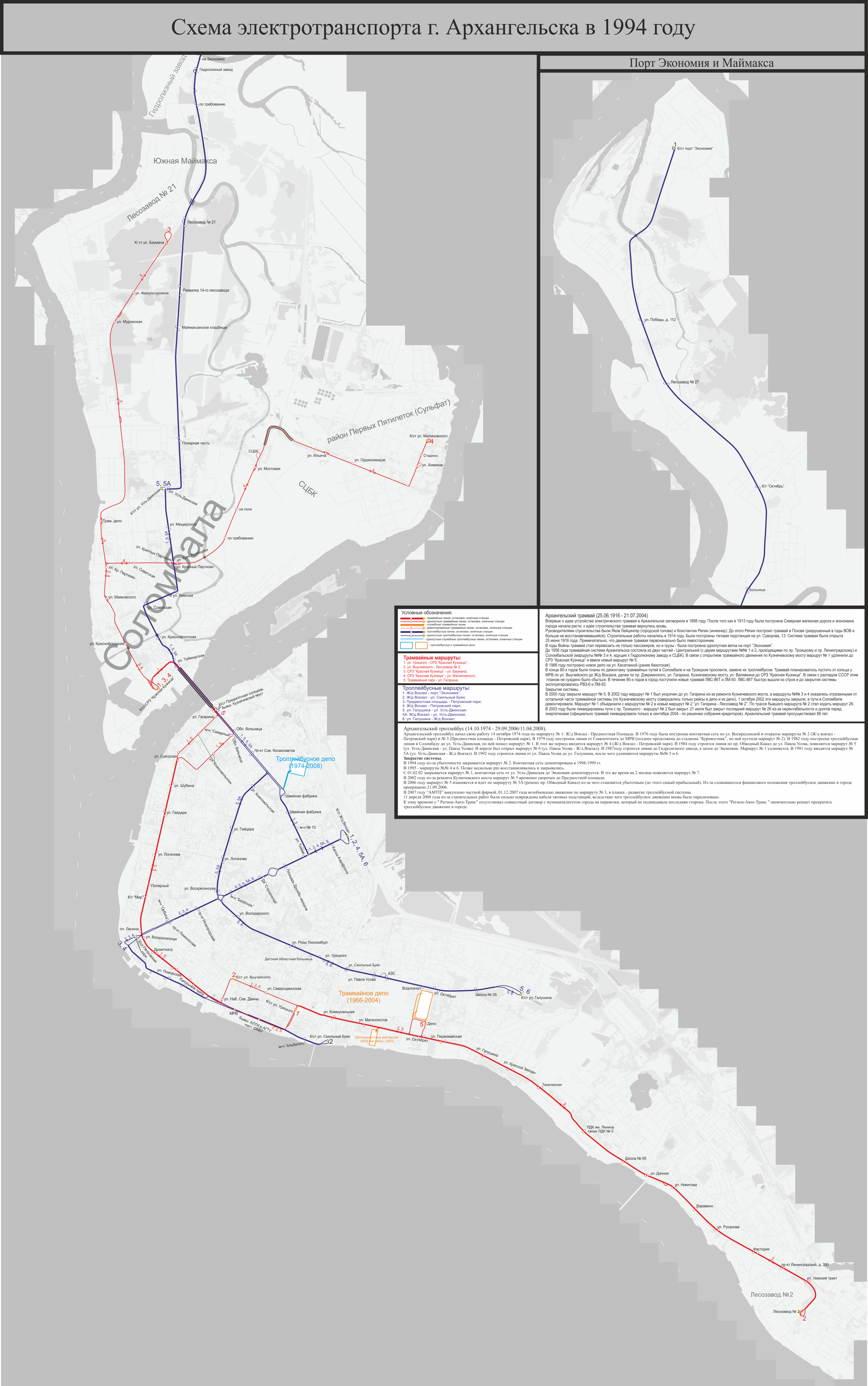 Схема расположения трамвайных путей и троллейбусных линий в период максимального развития системы в 1994 году.